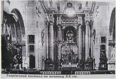 Інтер'єр Костелу Архангела Михаїла у Тиврові, Вінницька область, Україна, на початку ХХ століття